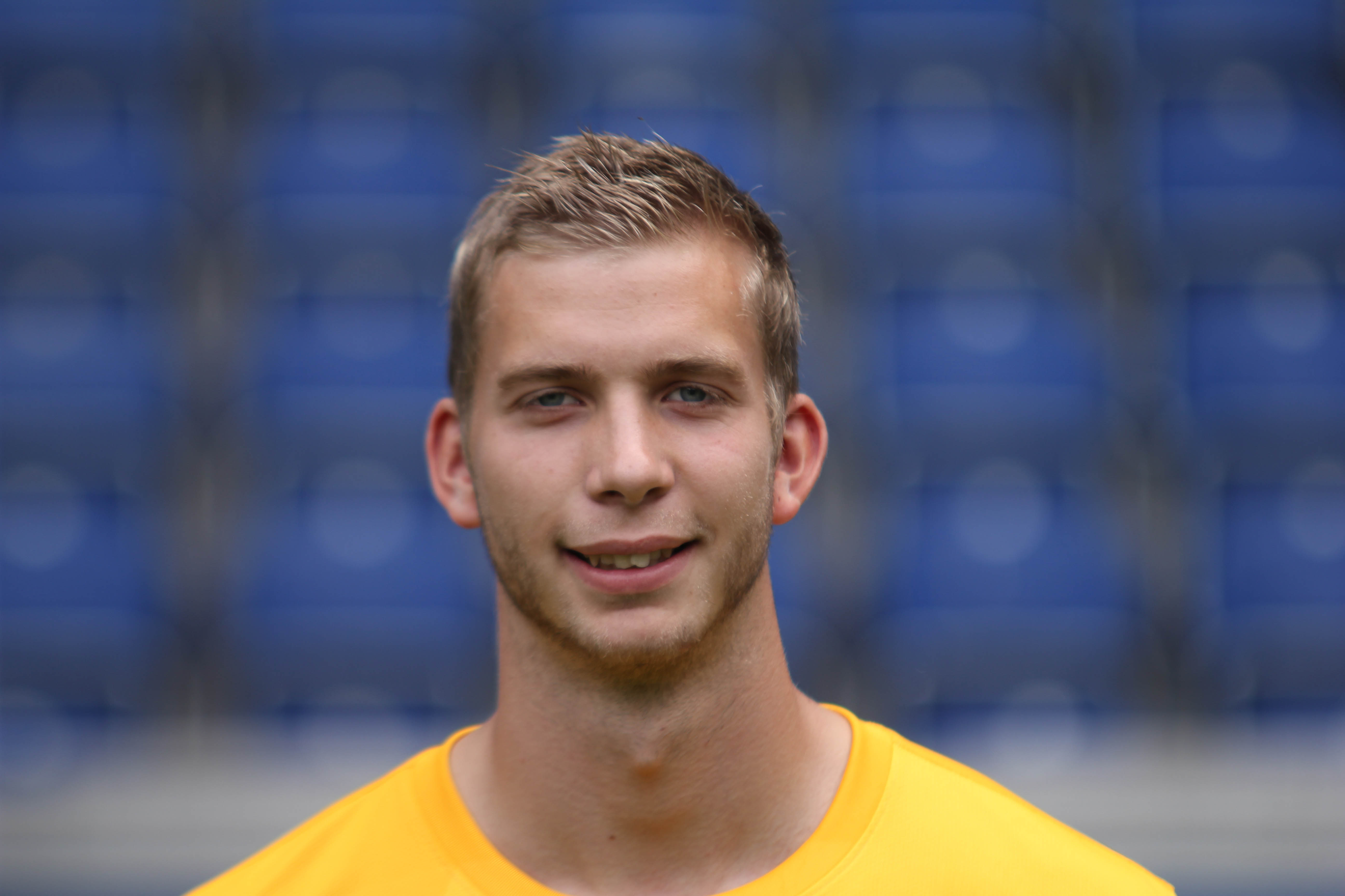 German football goalkeeper Felix Wiedwald, MSV Duisburg